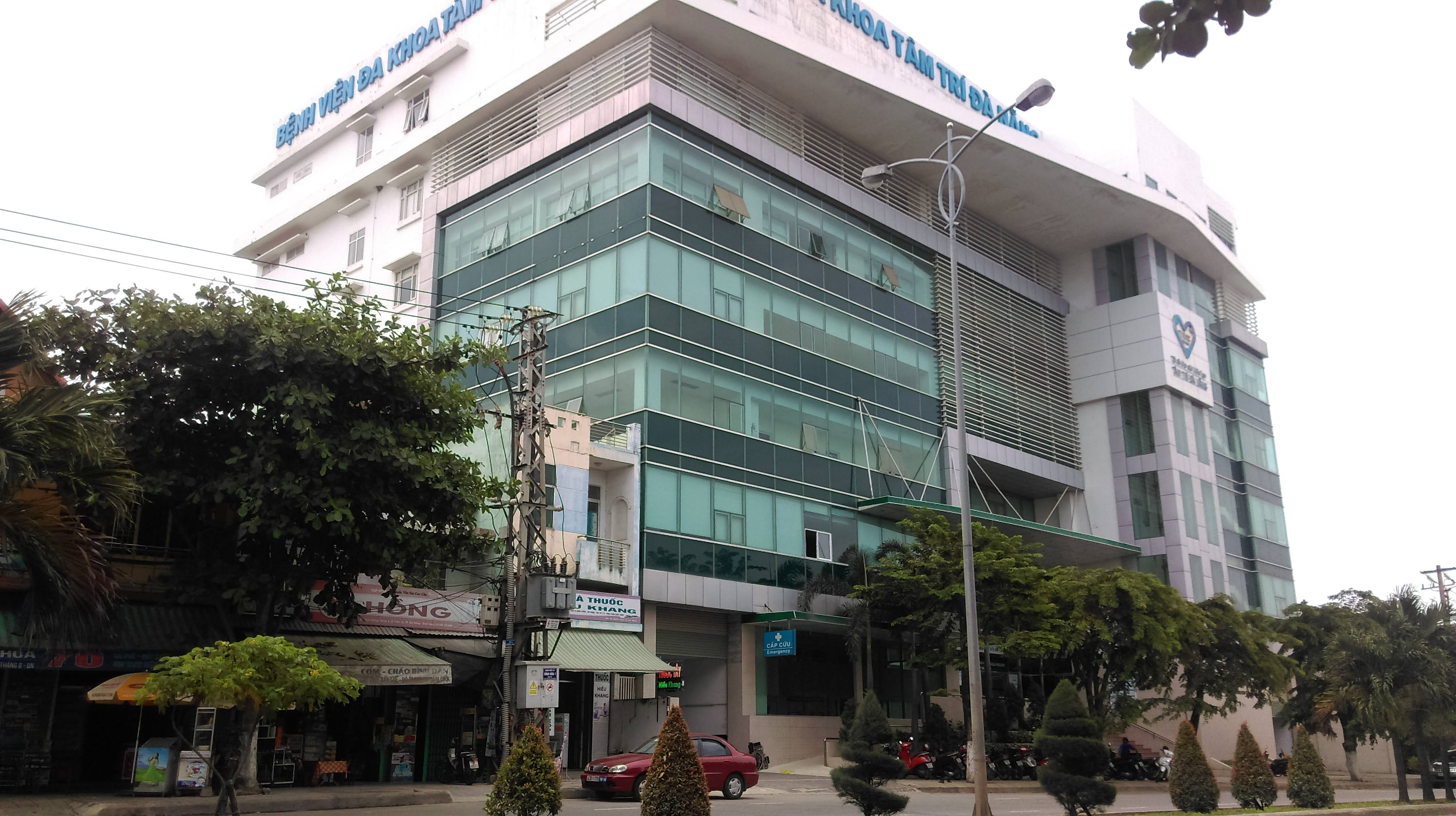 Bệnh viện Đa khoa Tâm Trí Đà Nẵng